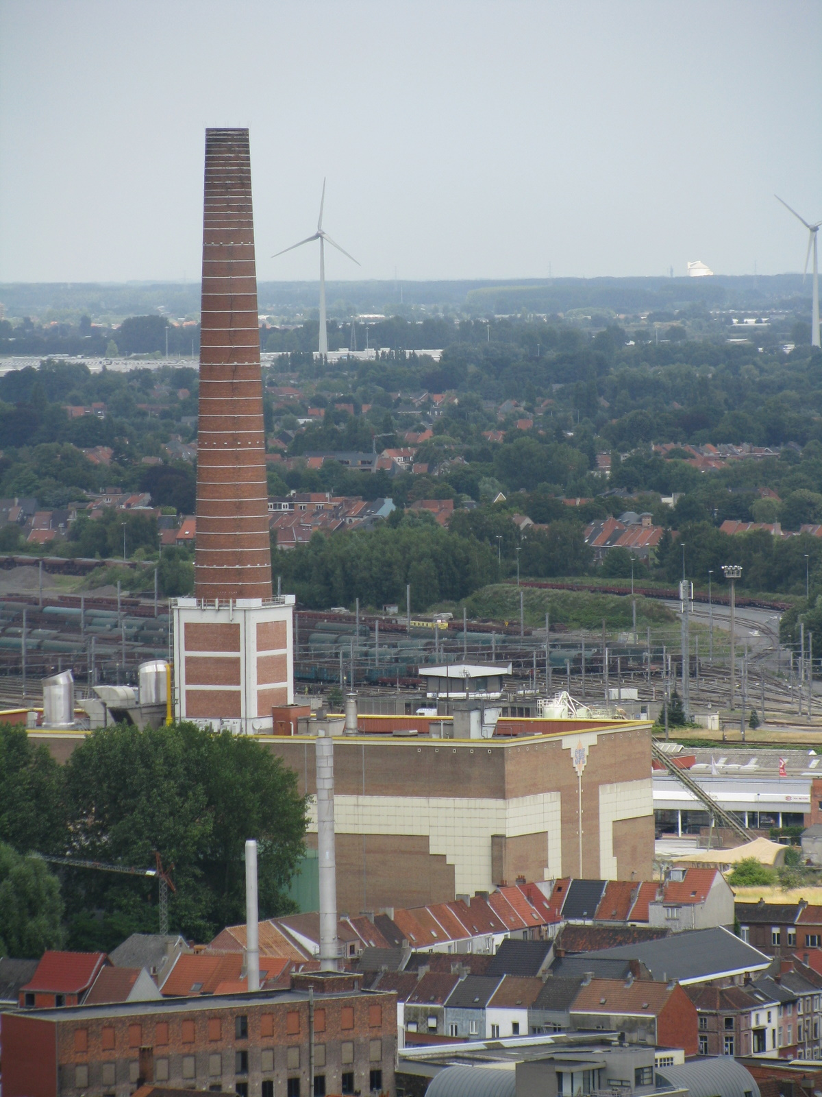 Ghent